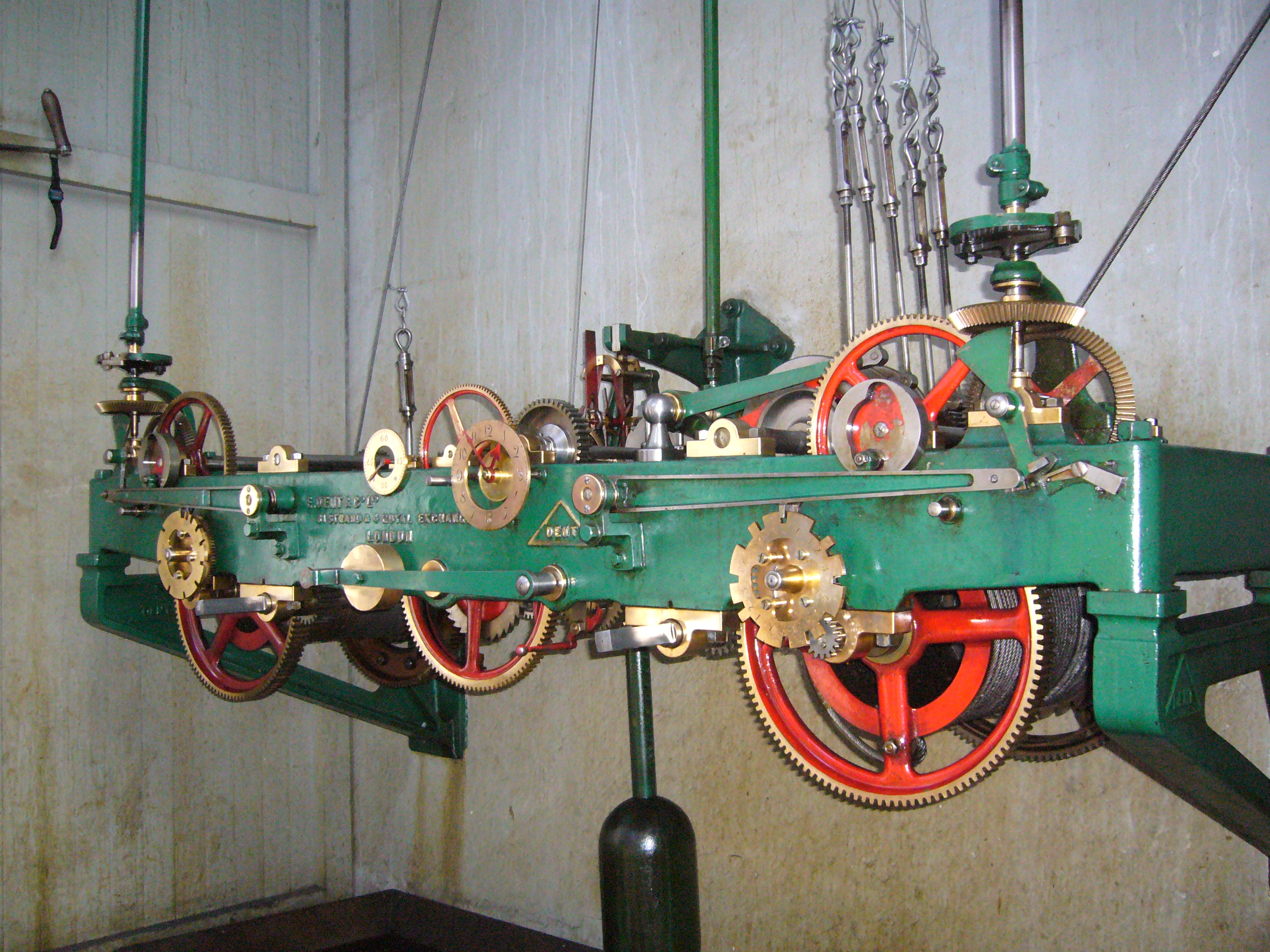 Foto de la maquinaria del Reloj de Pachuca